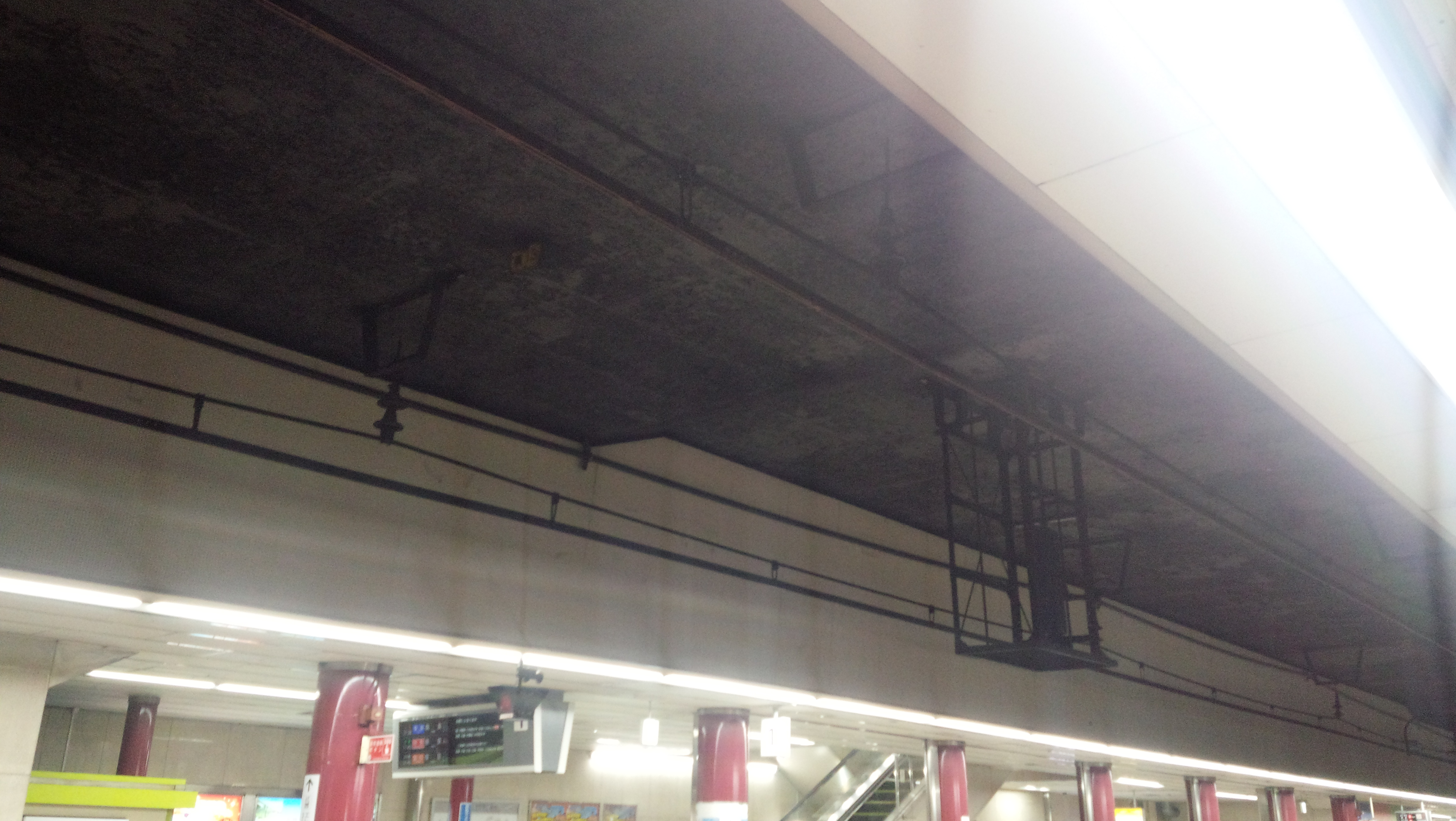 近鉄難波線で使用されているシンプルカテナリー式の剛体架線。